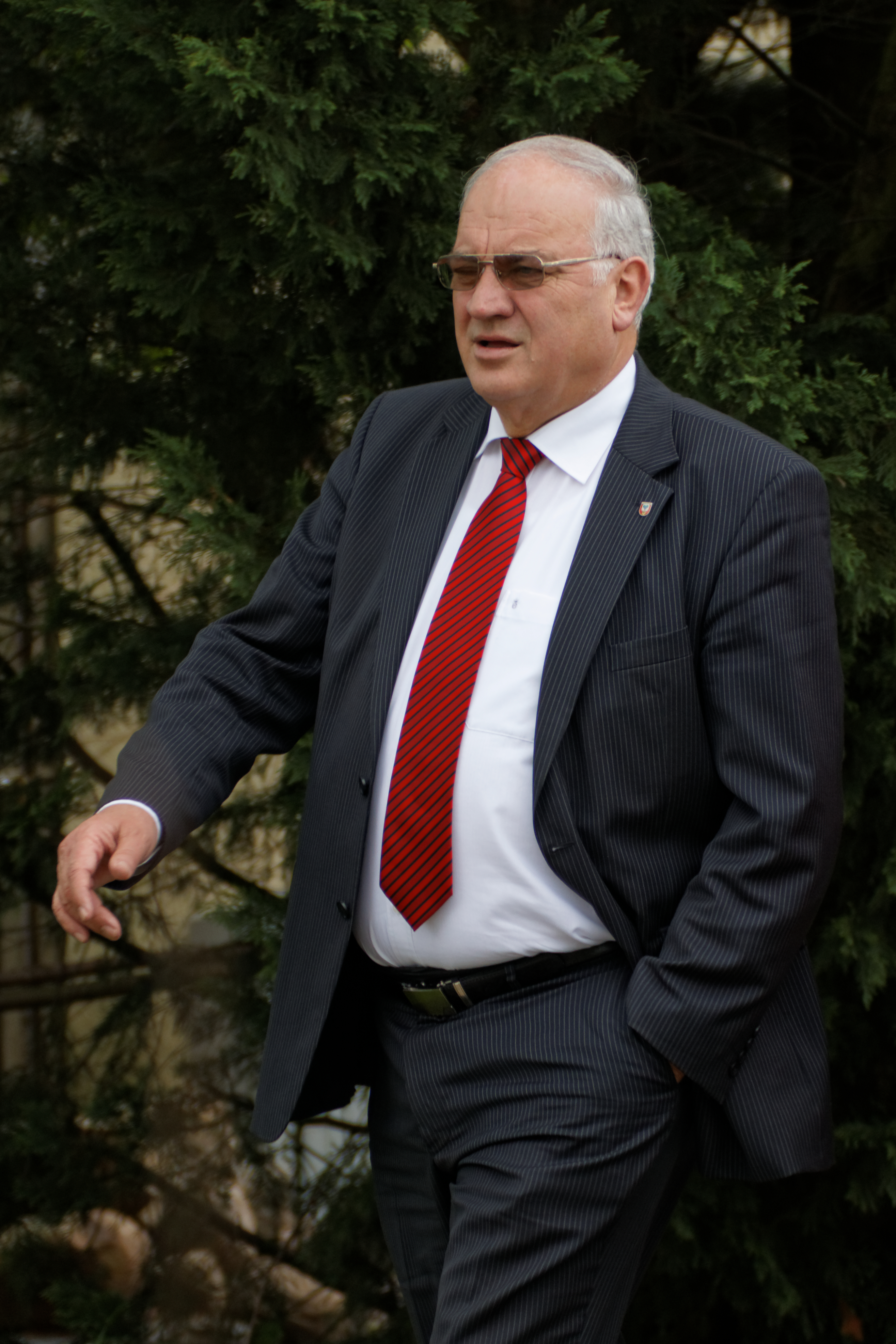 200-Jahr-Feier der Schlacht bei Großgörschen 1813